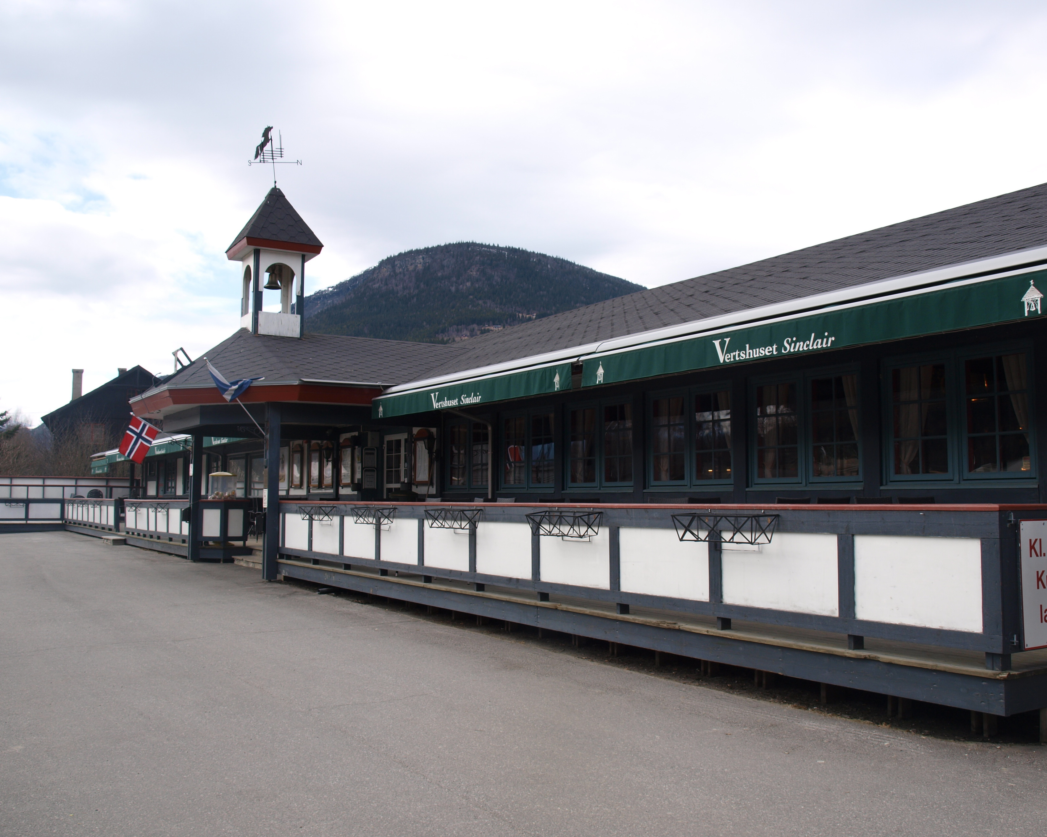 Vertshuset Sinclair i Kvam i Gudbrandsdalen.